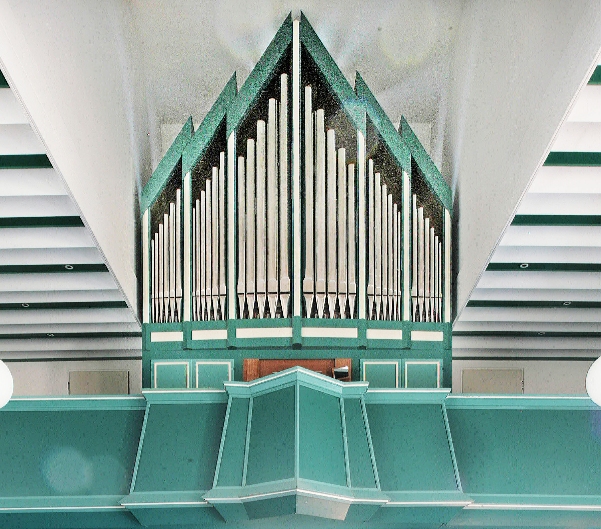 Orgel der Versöhnungskirche Harrislee, Kreis Schleswig-Flensburg, Schleswig-Holstein, Deutschland